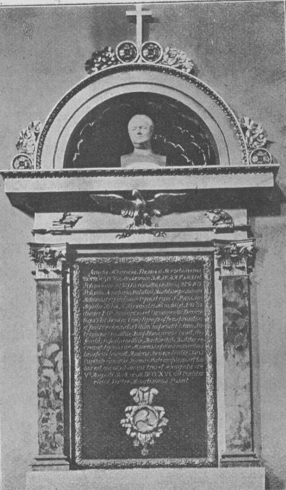 Tablica pamiątkowa ku czci generała i Naczelnika w Insurekcji kościuszkowskiej Tomasza Wawrzeckiego (zm. 1816)